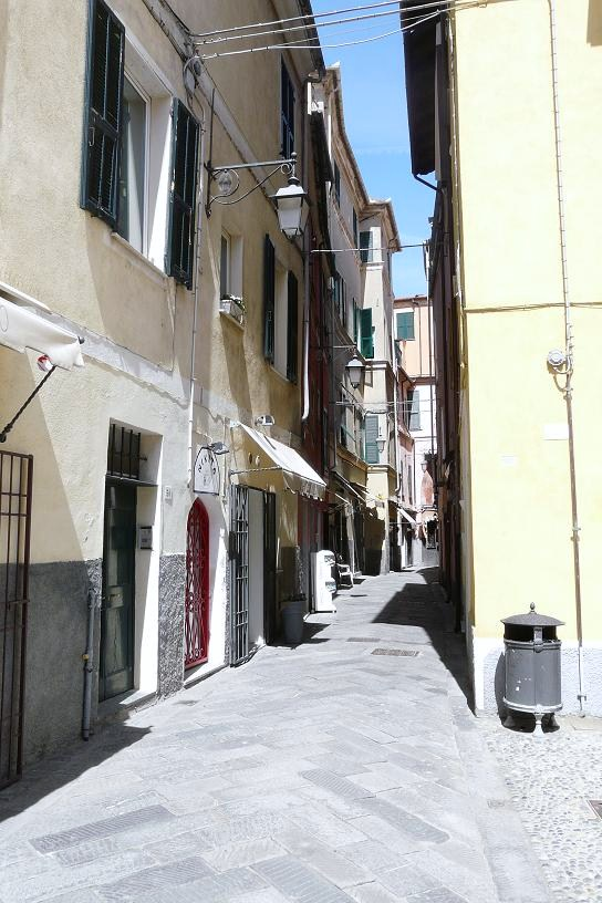 Foto varie di Laigueglia, Liguria, Italia